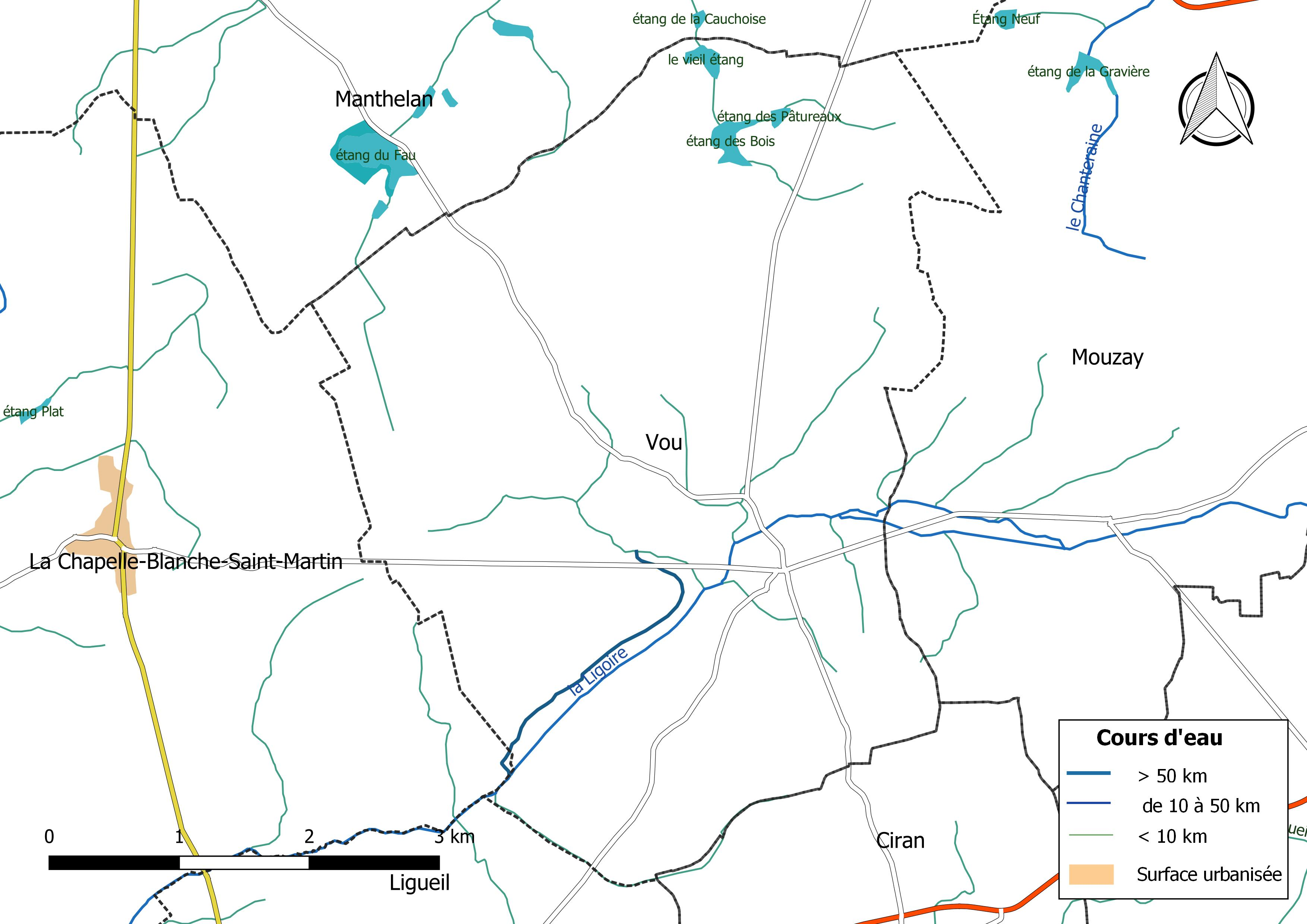 Carte du réseau hydrographique de la commune de Vou (France).